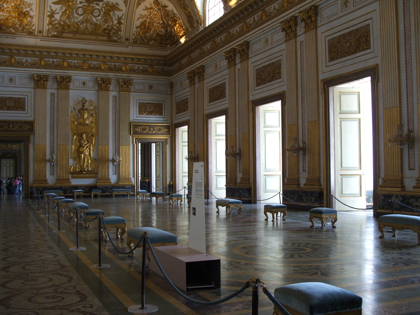 Caserta, immagini dalla Reggia di Caserta